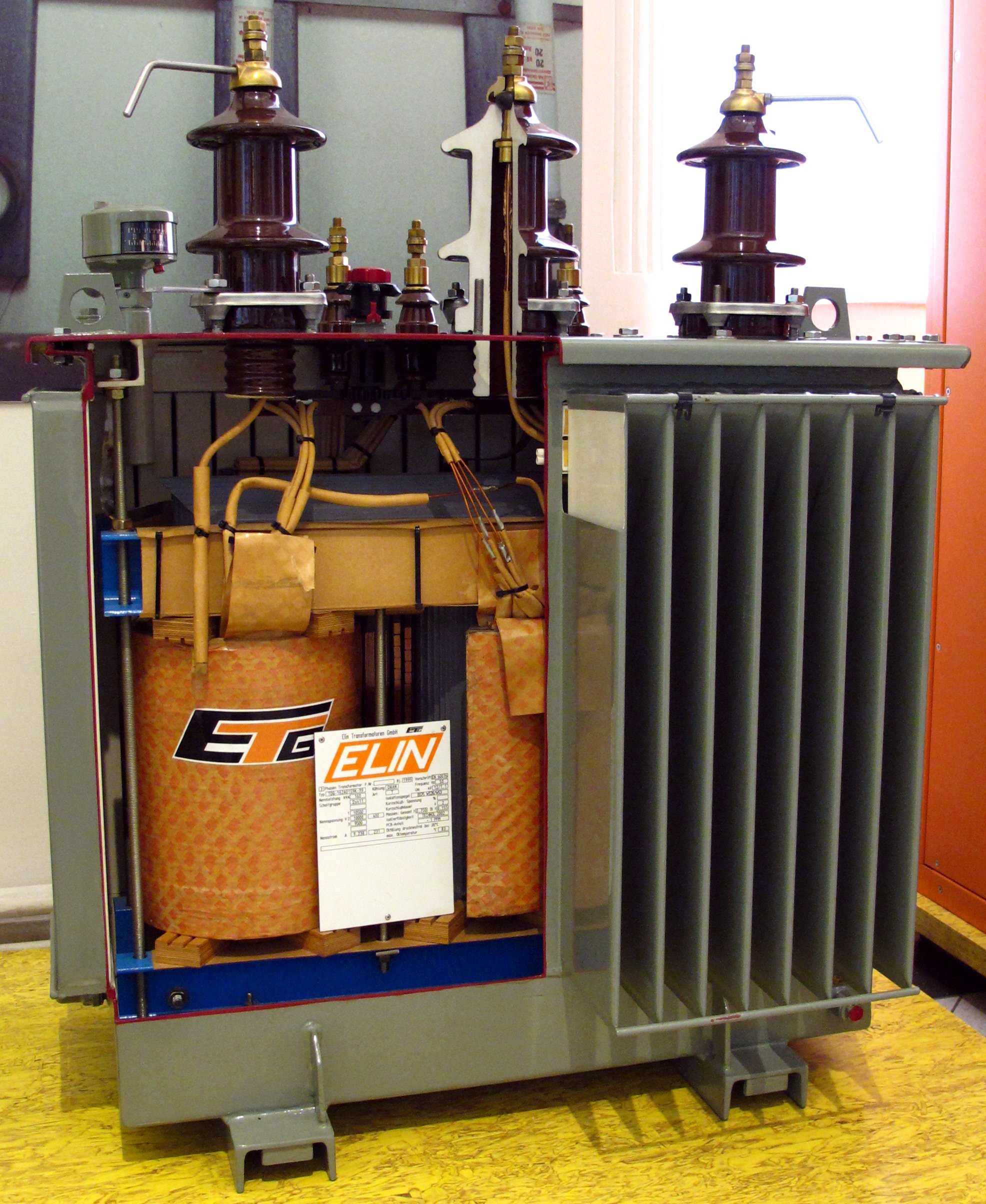 Schnittmodell eines Verteiltransformators. Hersteller: VA Tech Elin EBG Baujahr: 1999 Leistung: 160 kVA Oberspannung: 10 kV, Nennstrom: 9,238 A Unterspannung: 400 V, Nennstrom: 231 A